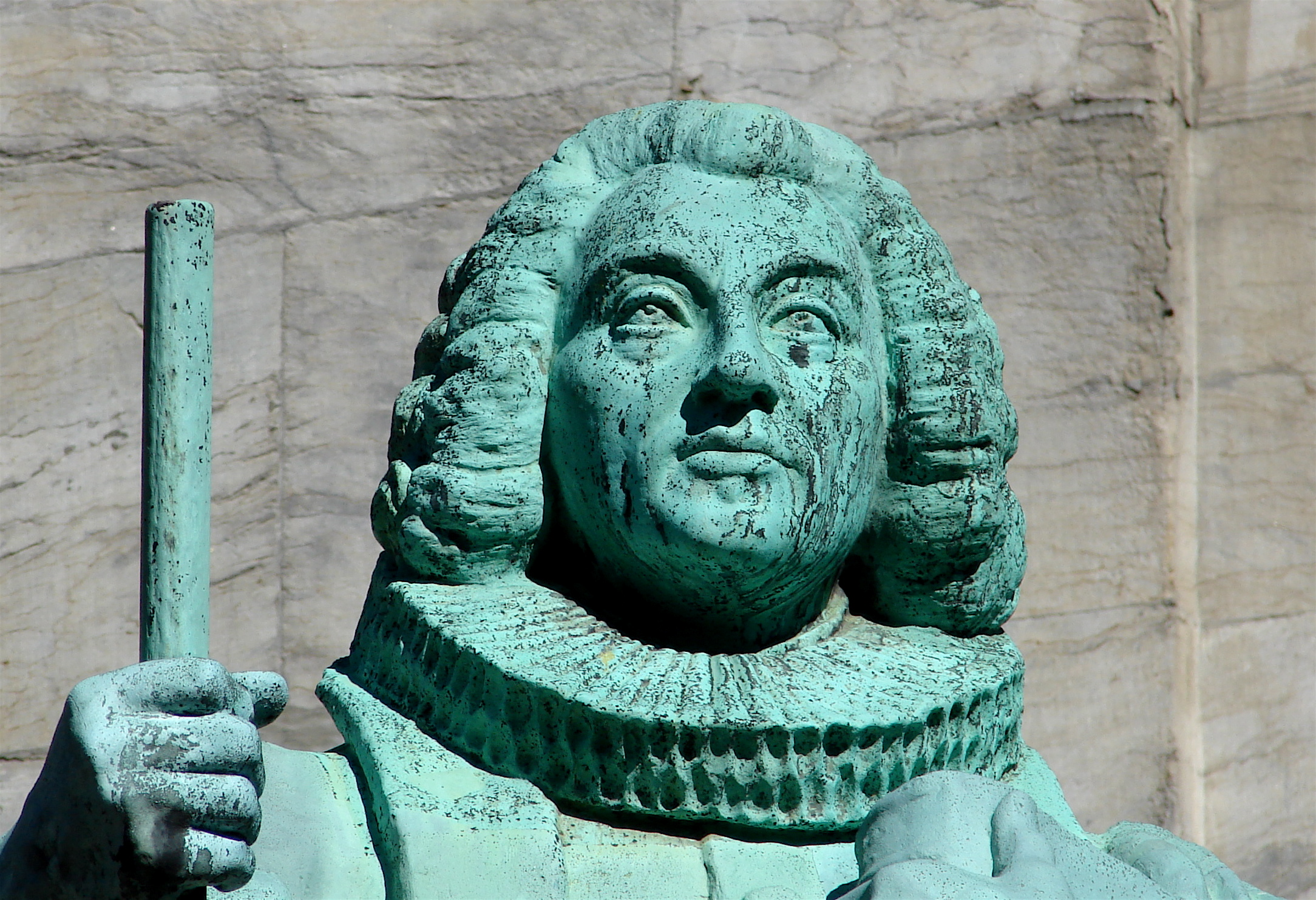 Hans Egede, Frederikskirken, København, August Saabye